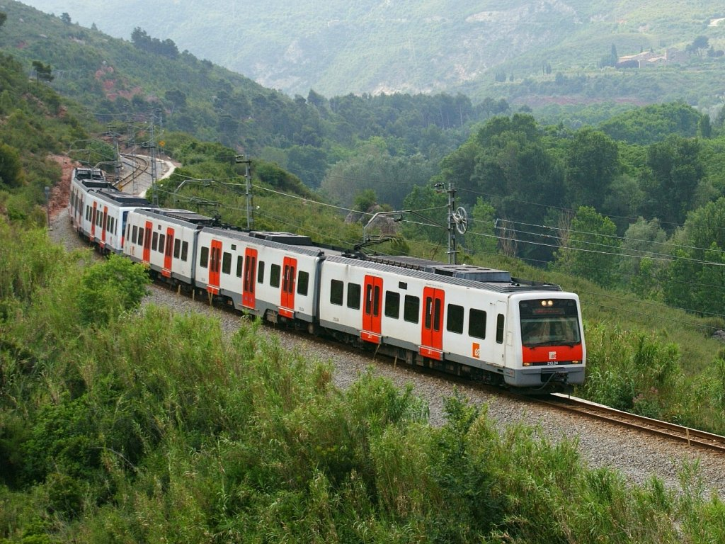 Doble d'unitats 213 apropant-se a l'estació de Montserrat Aeri (Monistrol de Montserrat).